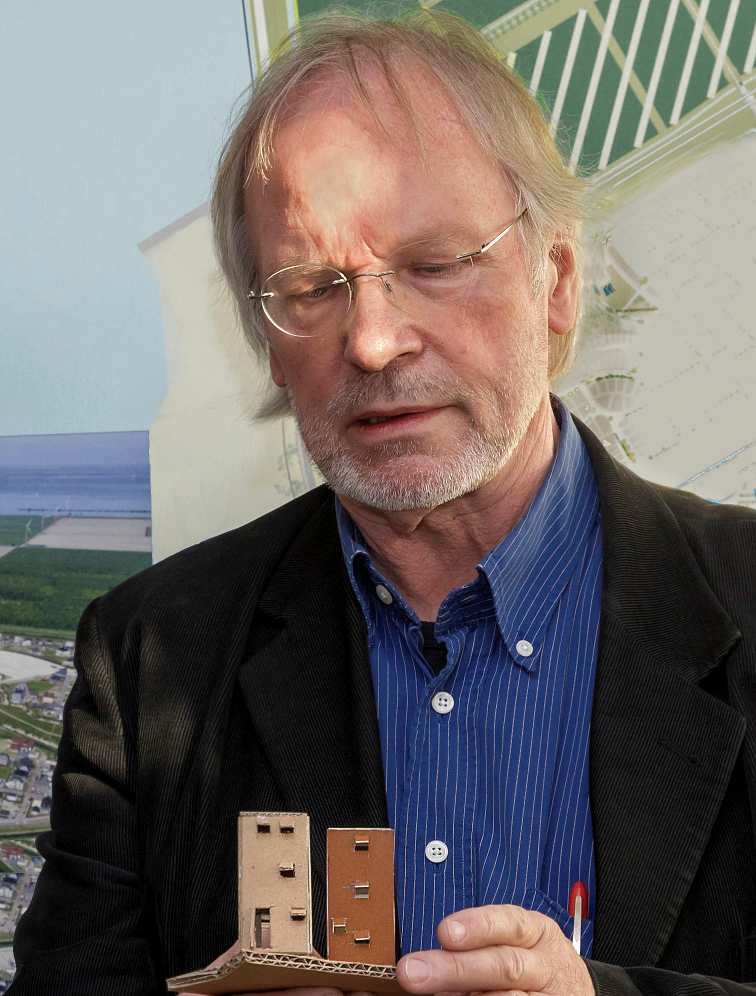 Han Slawik bei einer Präsentation in Almere mit Arbeitsmodellen der HomeBoxen 1 und 2.